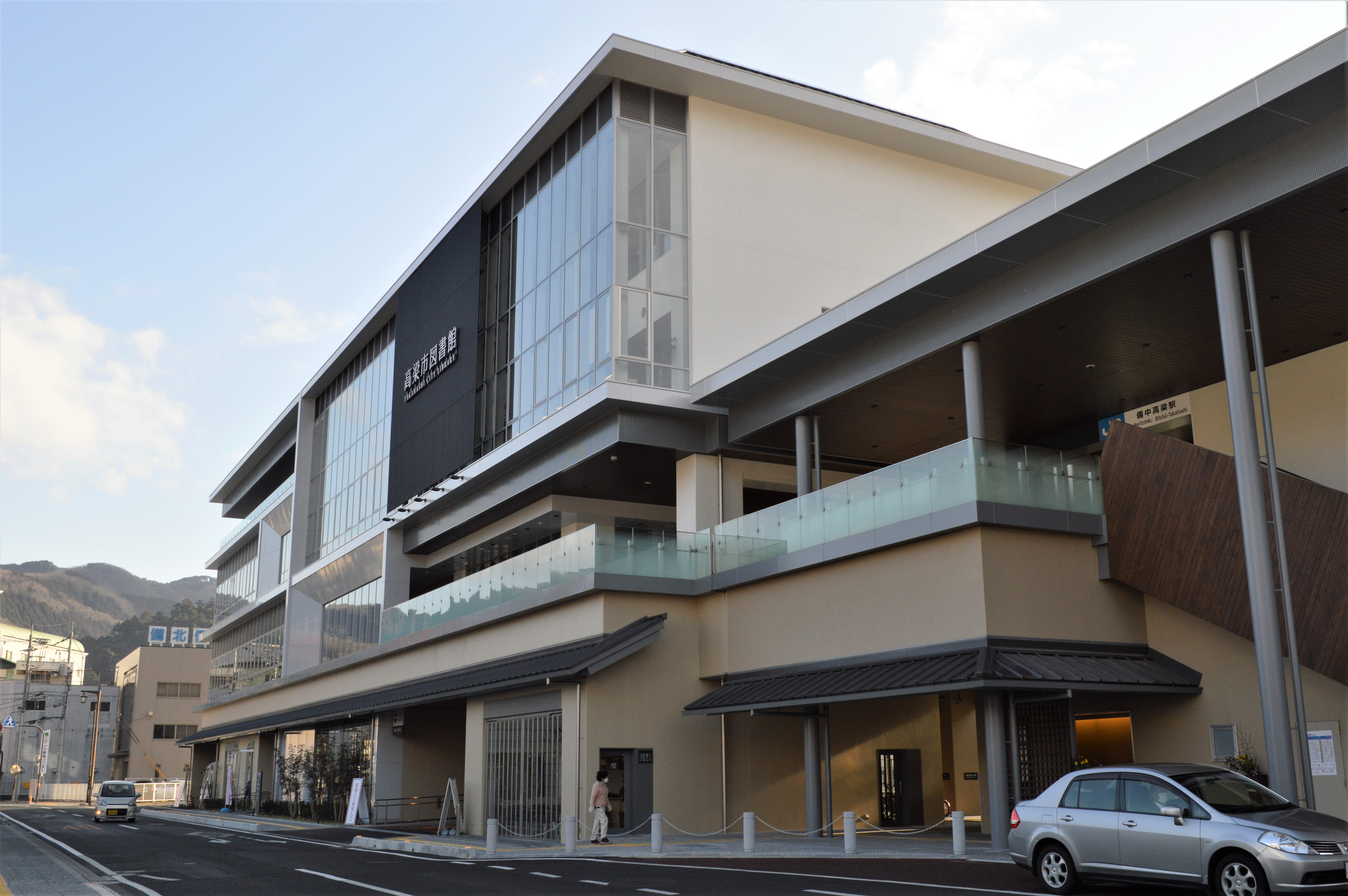 2017年2月に開館した高梁市図書館。